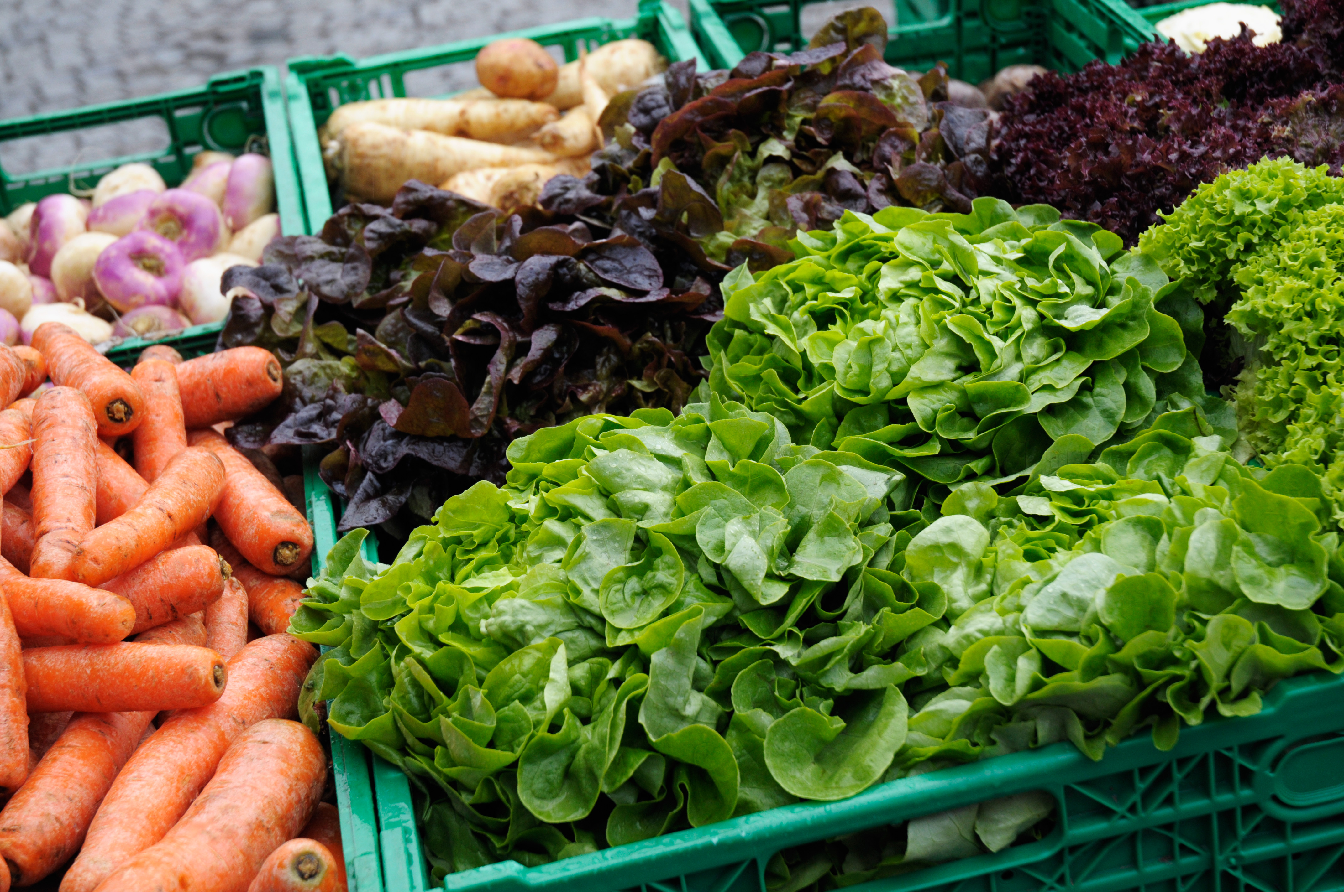 Grönsaker